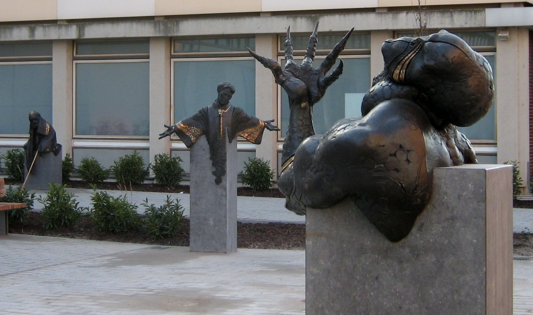 Der Schmerz, das Alter, der Franziskanerbruder